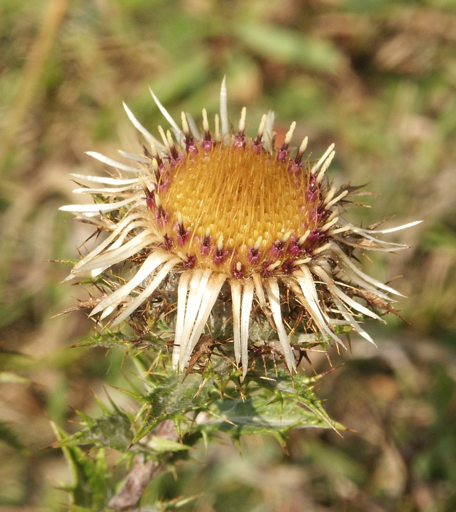 Carlina vulgaris, Frankenhöhe, Germany